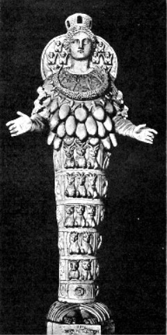 Kultbild der Artemis von Ephesos in Vatikan